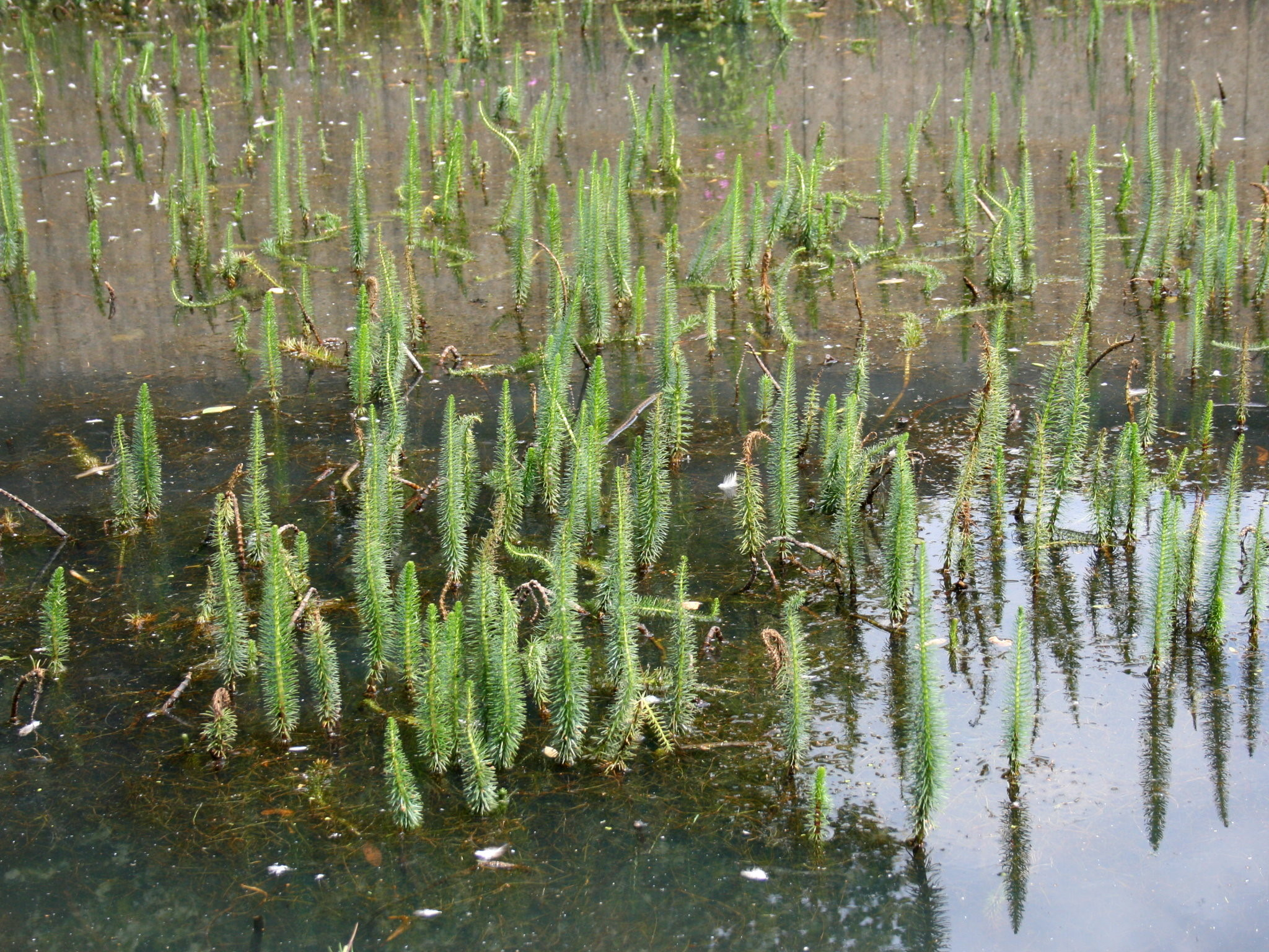 Haus Martfeld auf dem Martfeld in Schwelm